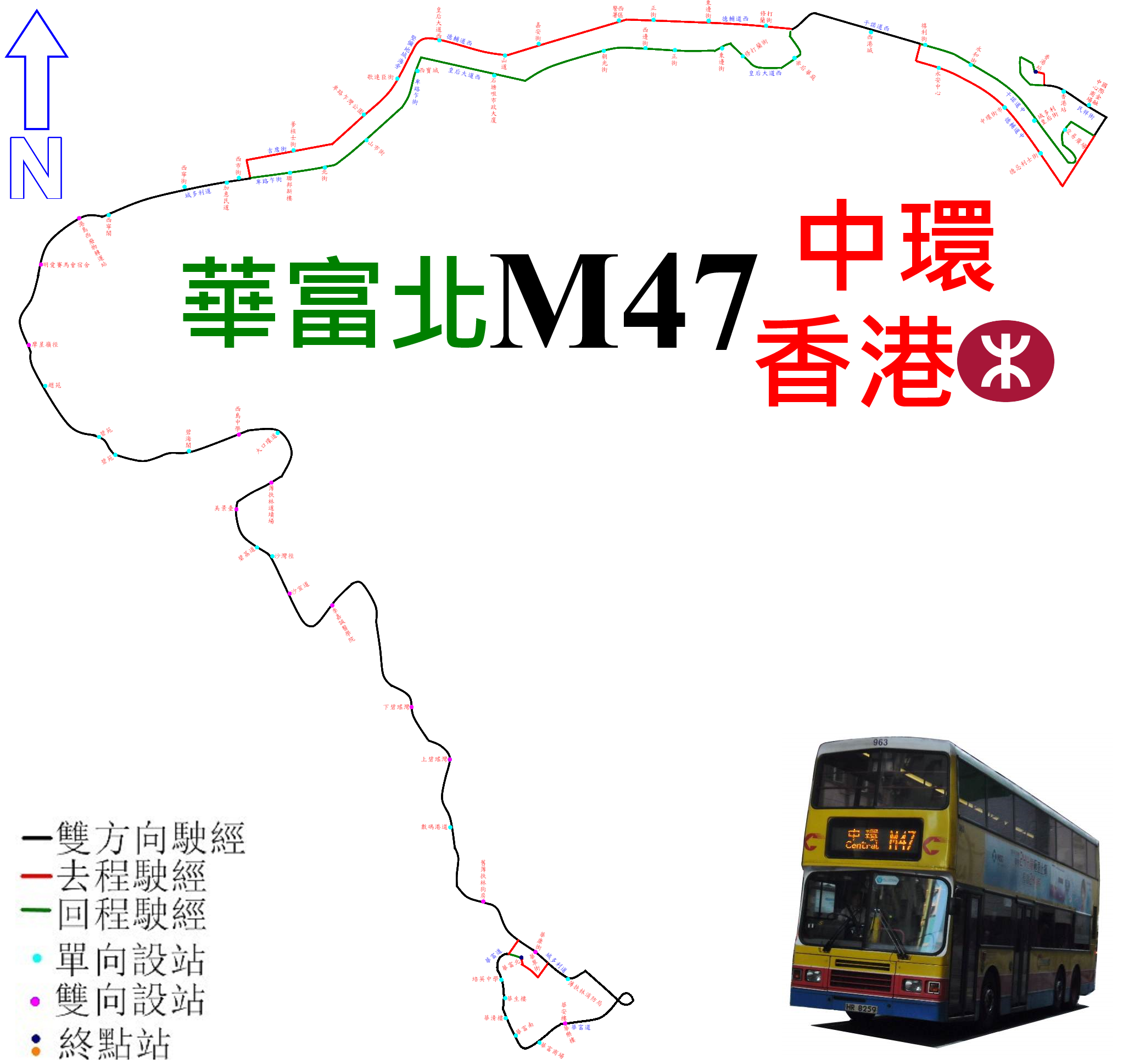 中文（香港）: 城巴M47線的走線圖